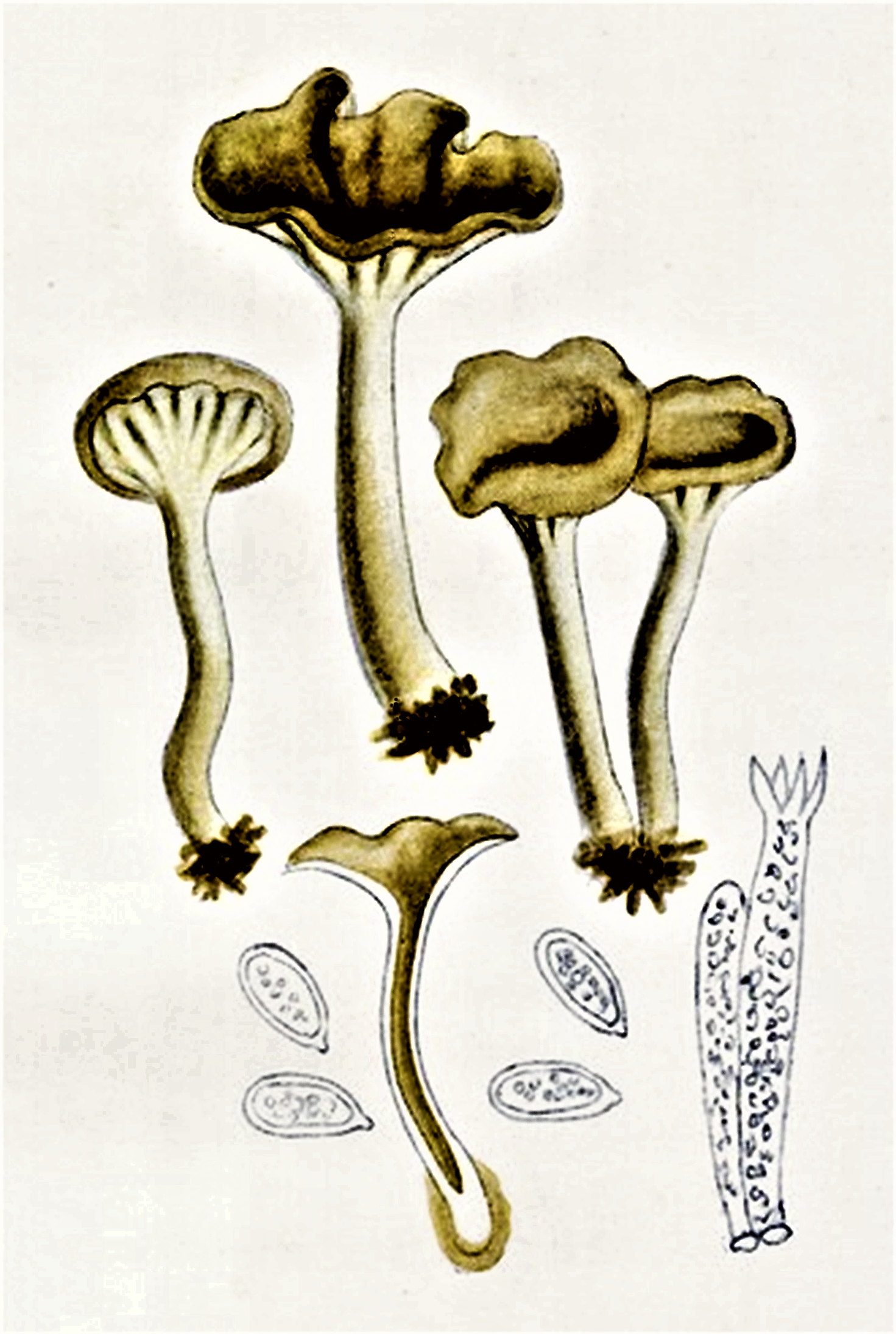 Giacomo Bresadola: Craterellus crispus (Bull., 1790) Berk. (1860), heute Craterellus sinuosus Fr., 1821) Fr. (1838) bzw. Pseudocraterellus undulatus (Pers., 1801) Rauschert (1987)